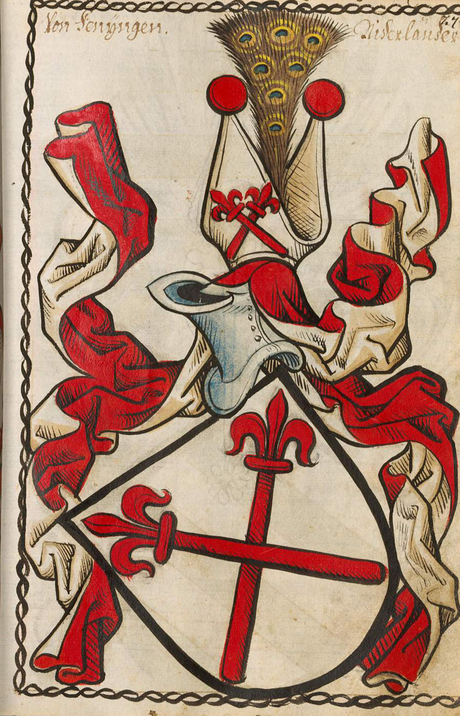 Scheibler'sches Wappenbuch , älterer Teil; Seite 271 Von Fenyngen Niederländer